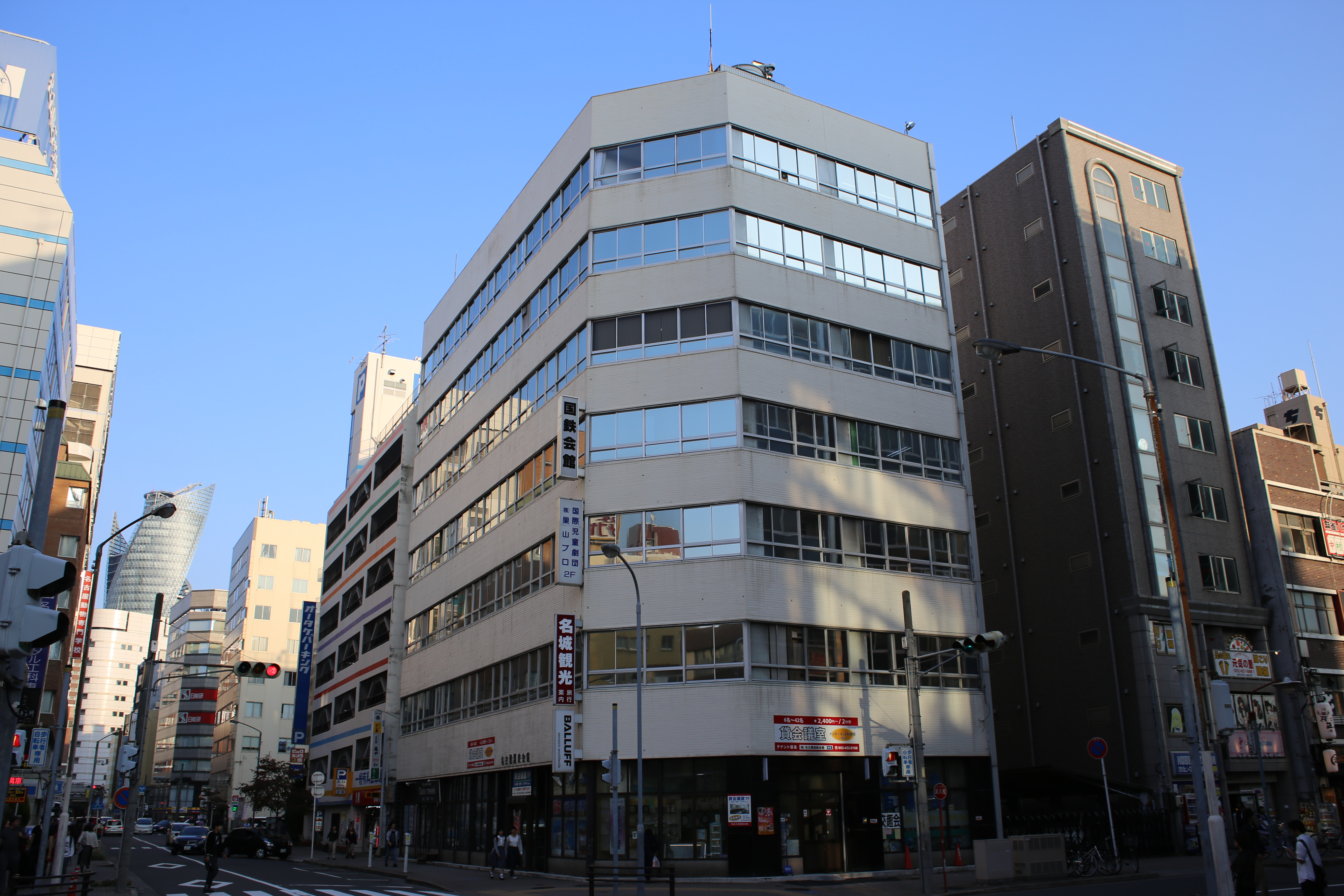 名古屋市中村区椿町の国鉄会館を北側公道西側より撮影